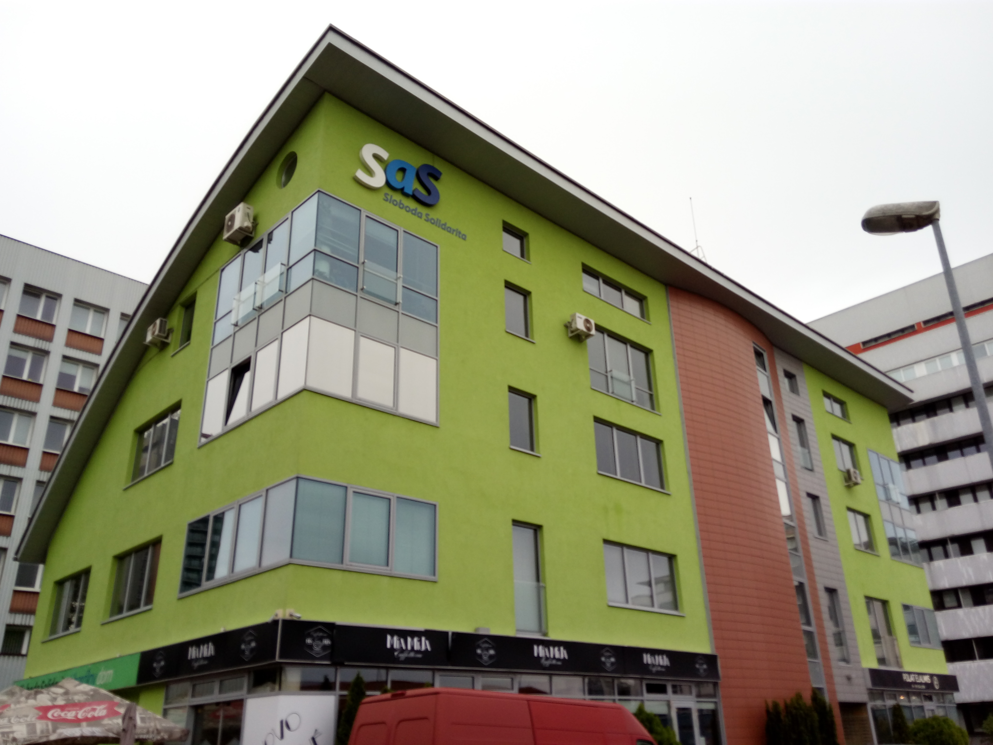 Priemyselná, Ružinov, Bratislava